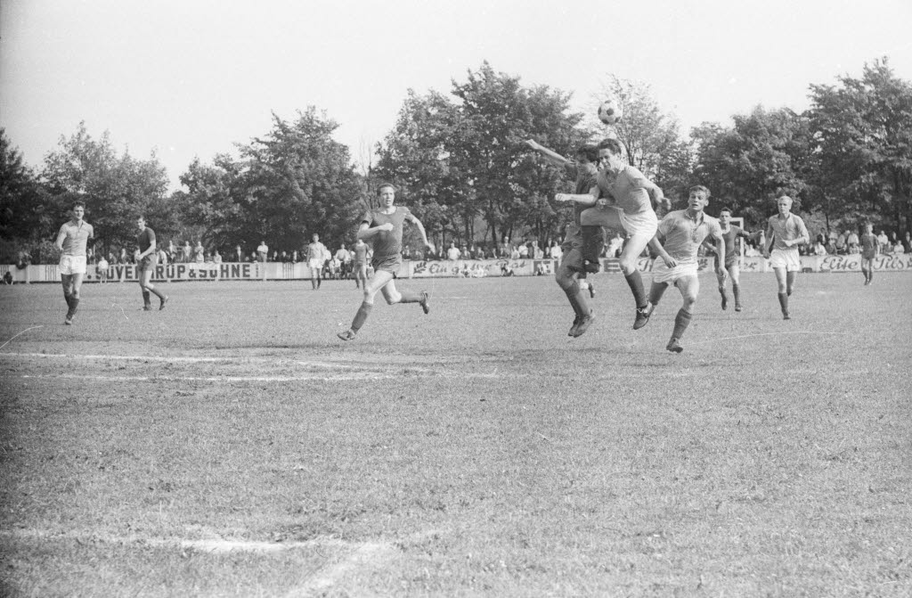 auf dem Kilia-Fußballplatz am Hasseldieksdammer Weg.